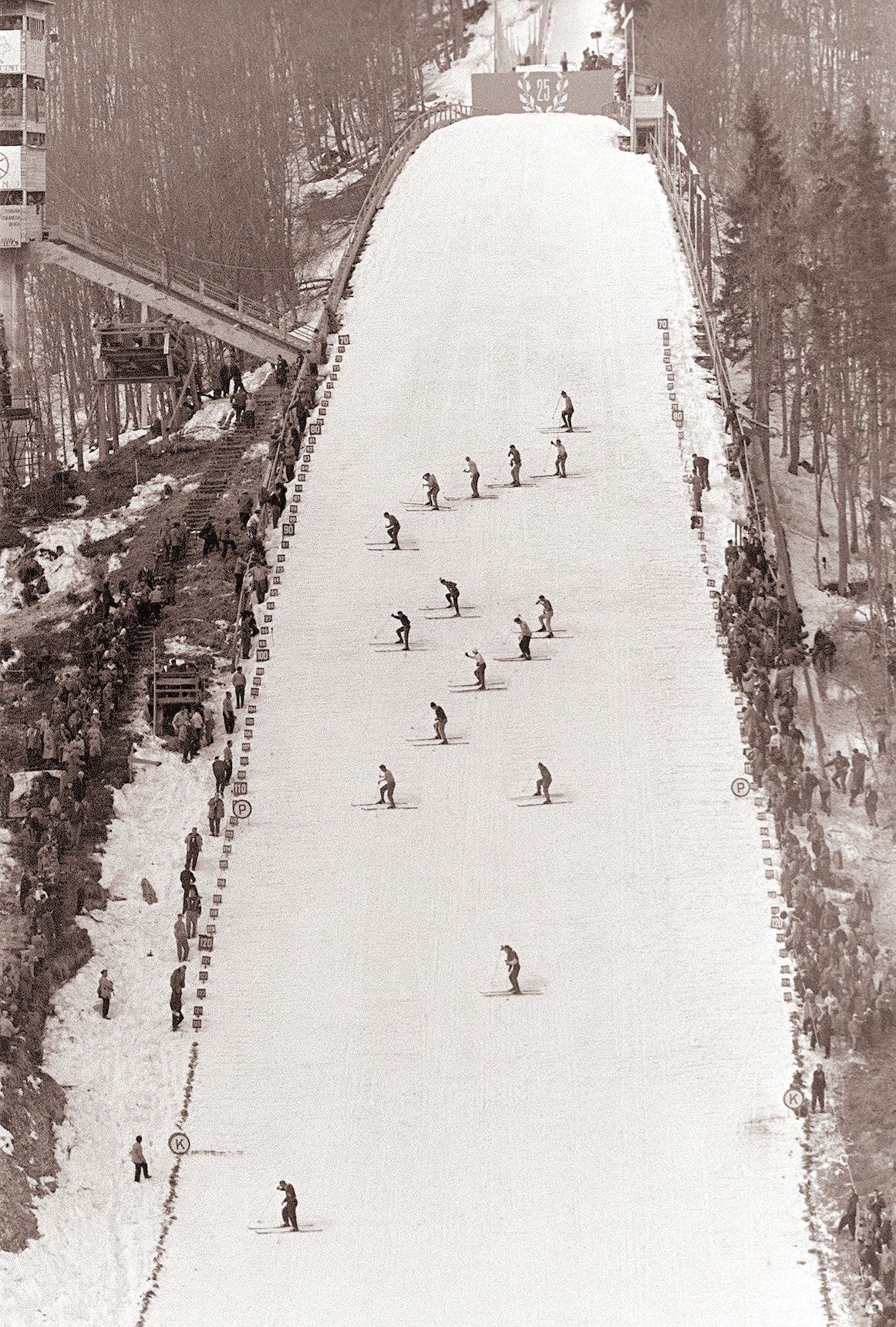 Tekma ob 25-letnici planiške mamutske skakalnice, nedelja